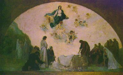 Boceto de la Cúpula de la Iglesia de Porcuna. 1903. Óleo sobre papel pegado en tabla. 83 x 133 cm. Jaén.